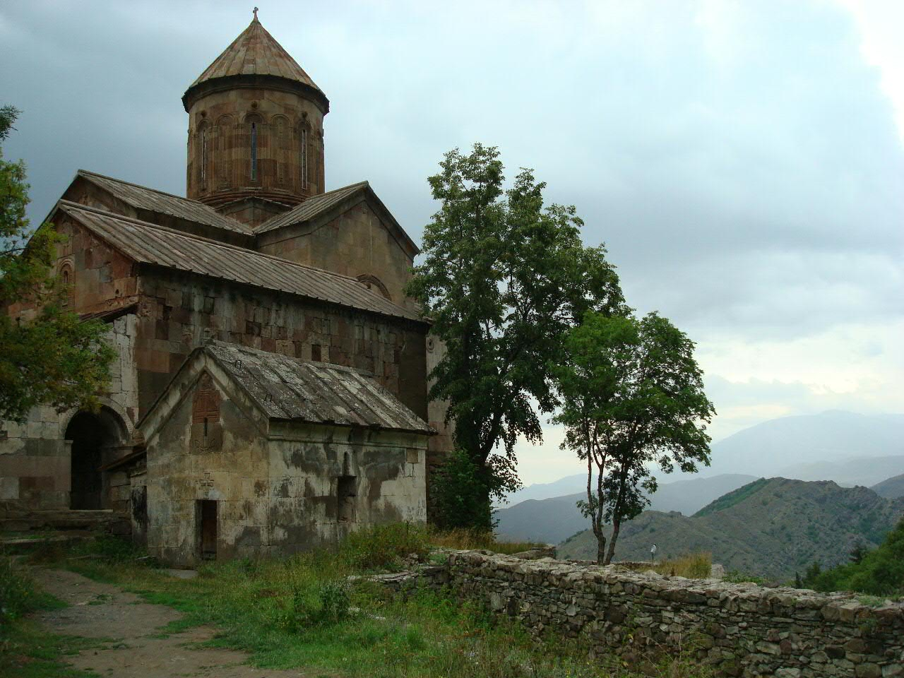 Sapara